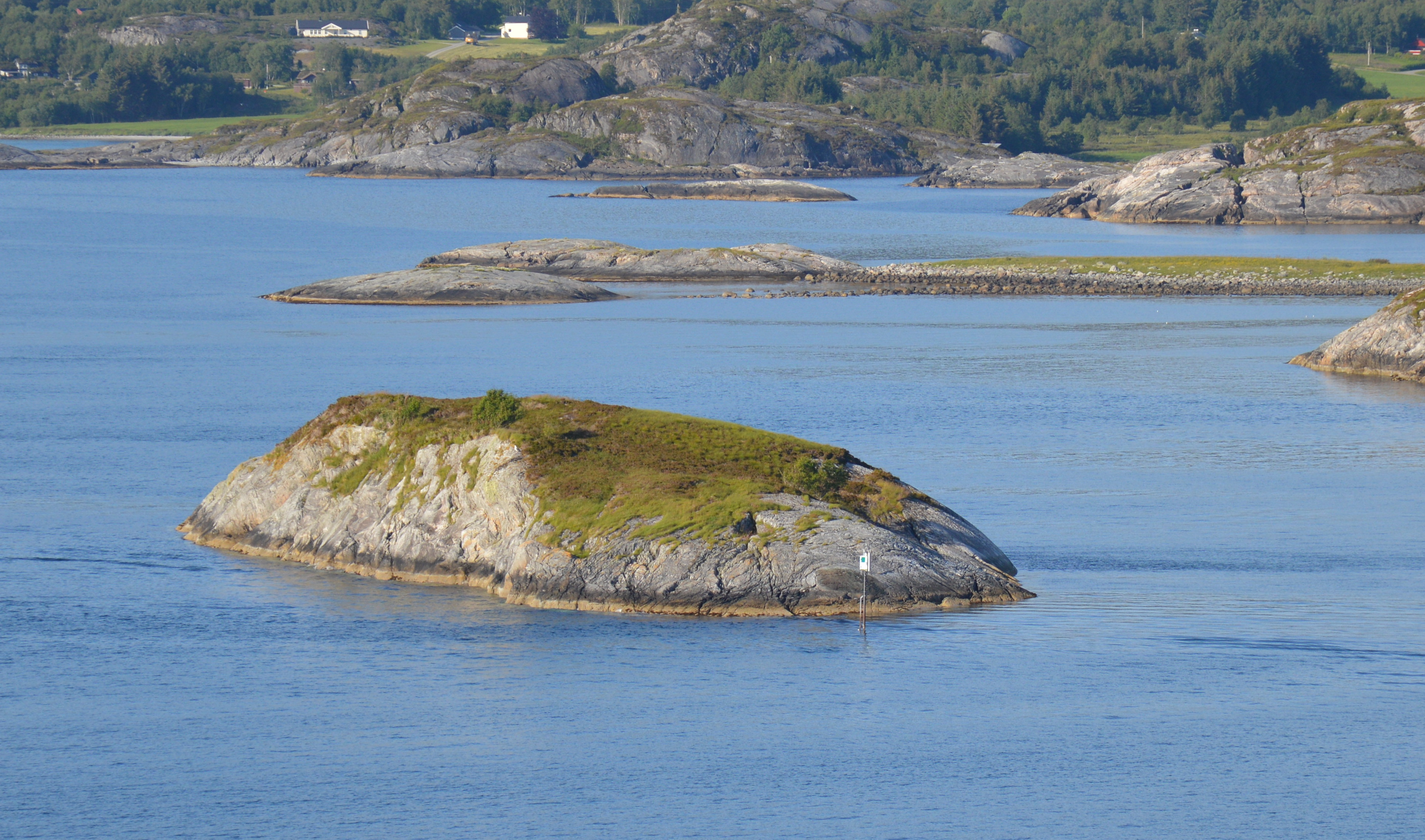 Hæringen